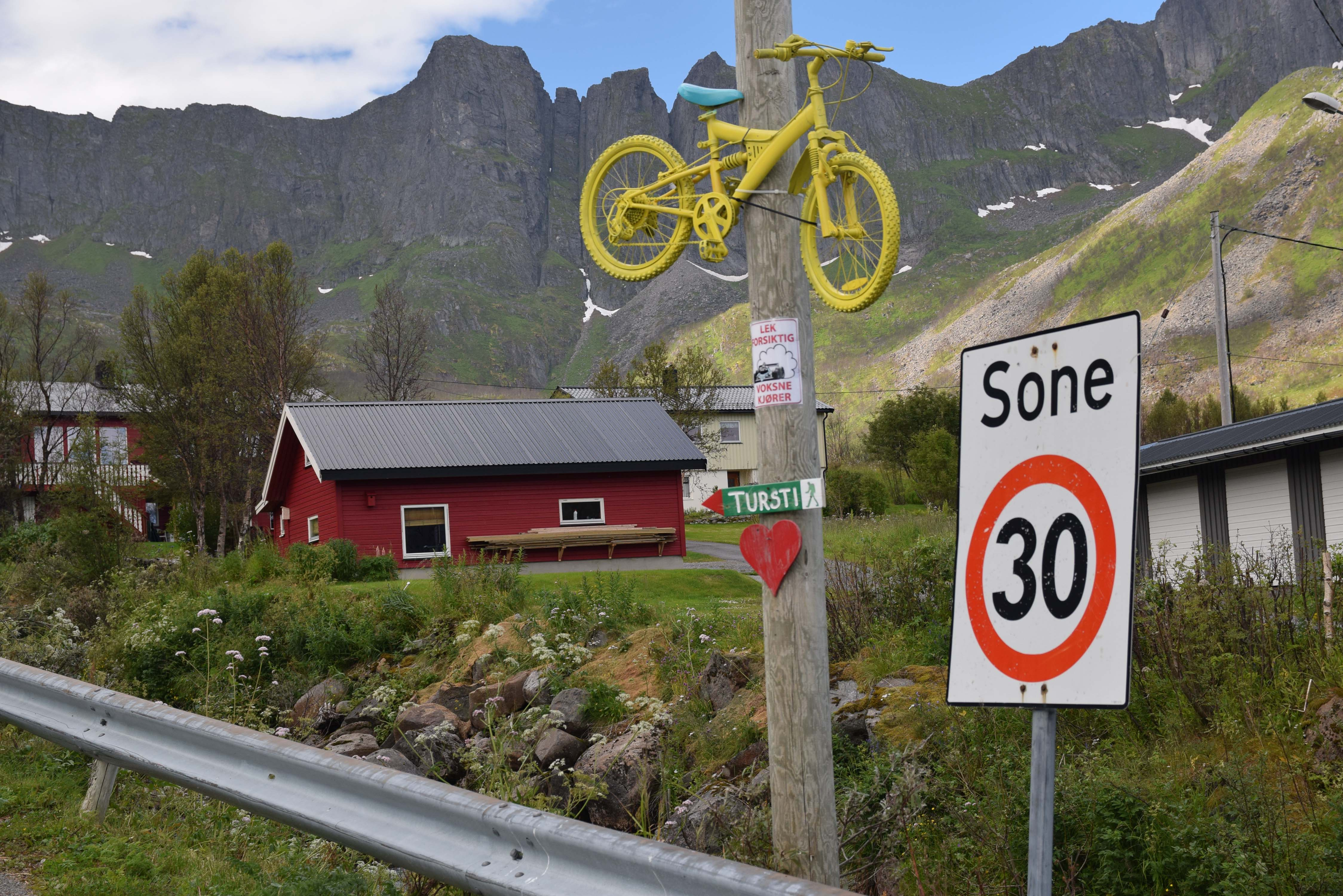 Sign for Arctic Race of Norway 2015 Mefjordvær Senja